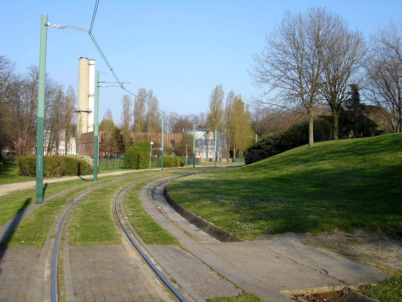 Voie d'accès aux ateliers du tramway dans le parc de la Bergère à Bobigny (Seine-Saint-Denis), France